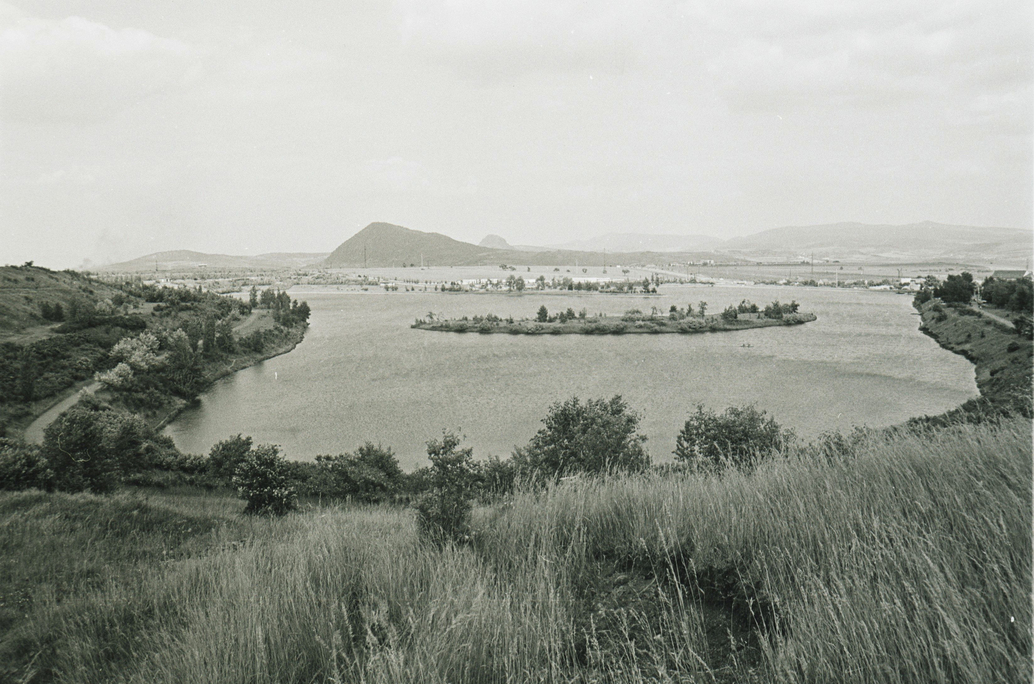 Původní podoba zatopeného lomu / jezera Benedikt na fotografii Jaroslava Kleina.